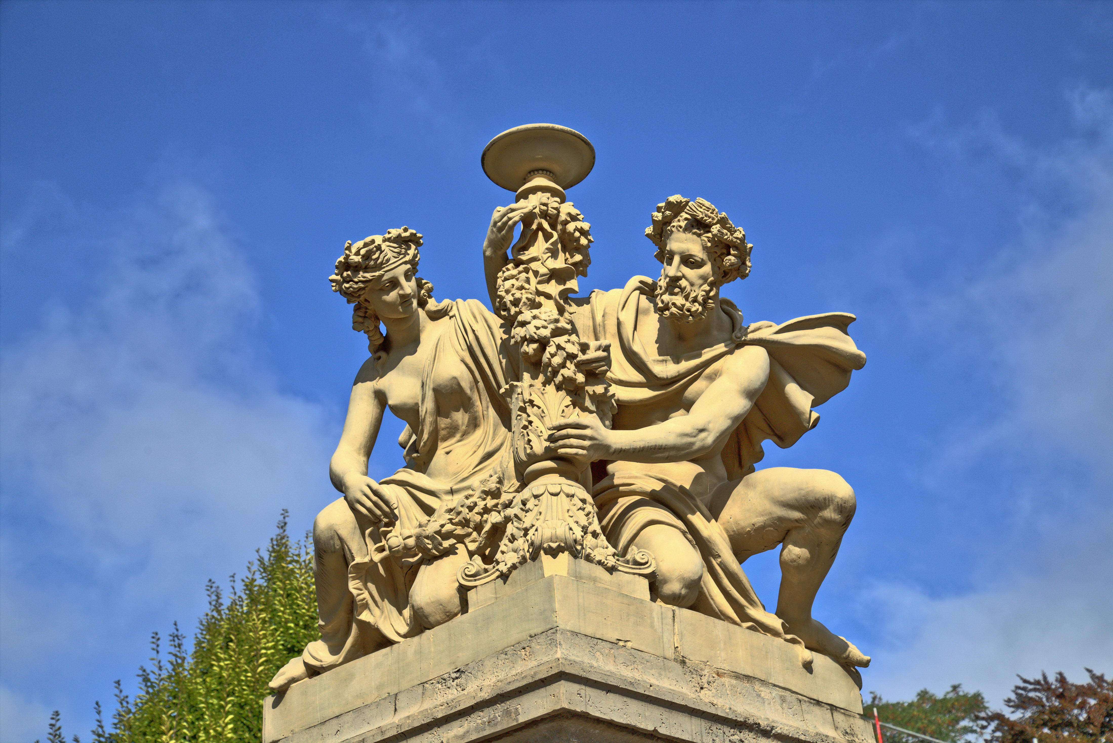 Radebeul, Figurengruppe am Sophienhof, Ernst-Bilz-Str., Denkmalspflege: 9000-I und 9000-II